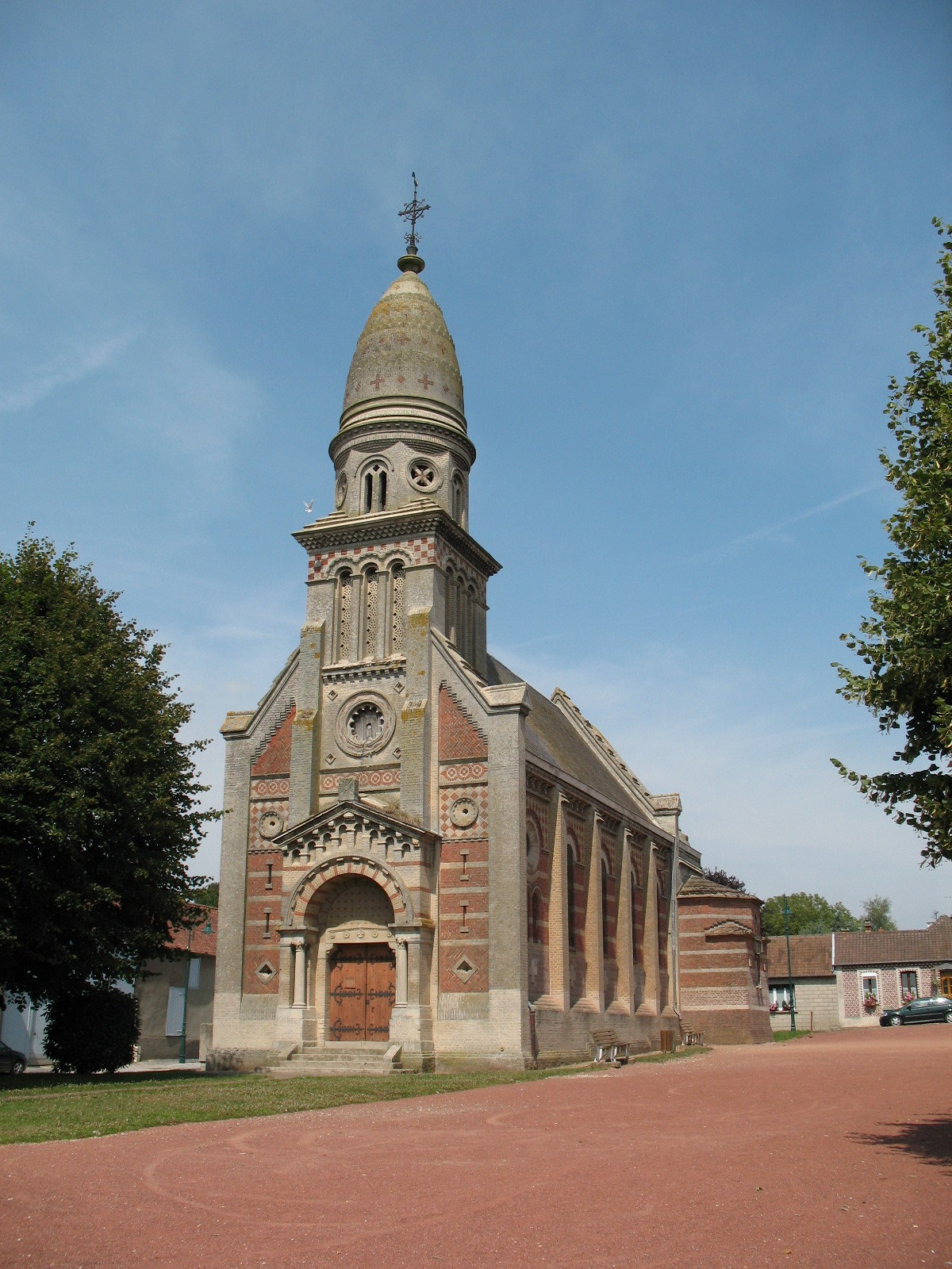 L'église de Cardonnette date de 1895. De style néo-roman et néo-byzantin, elle comporte des éléments empruntés à l'art islamique.